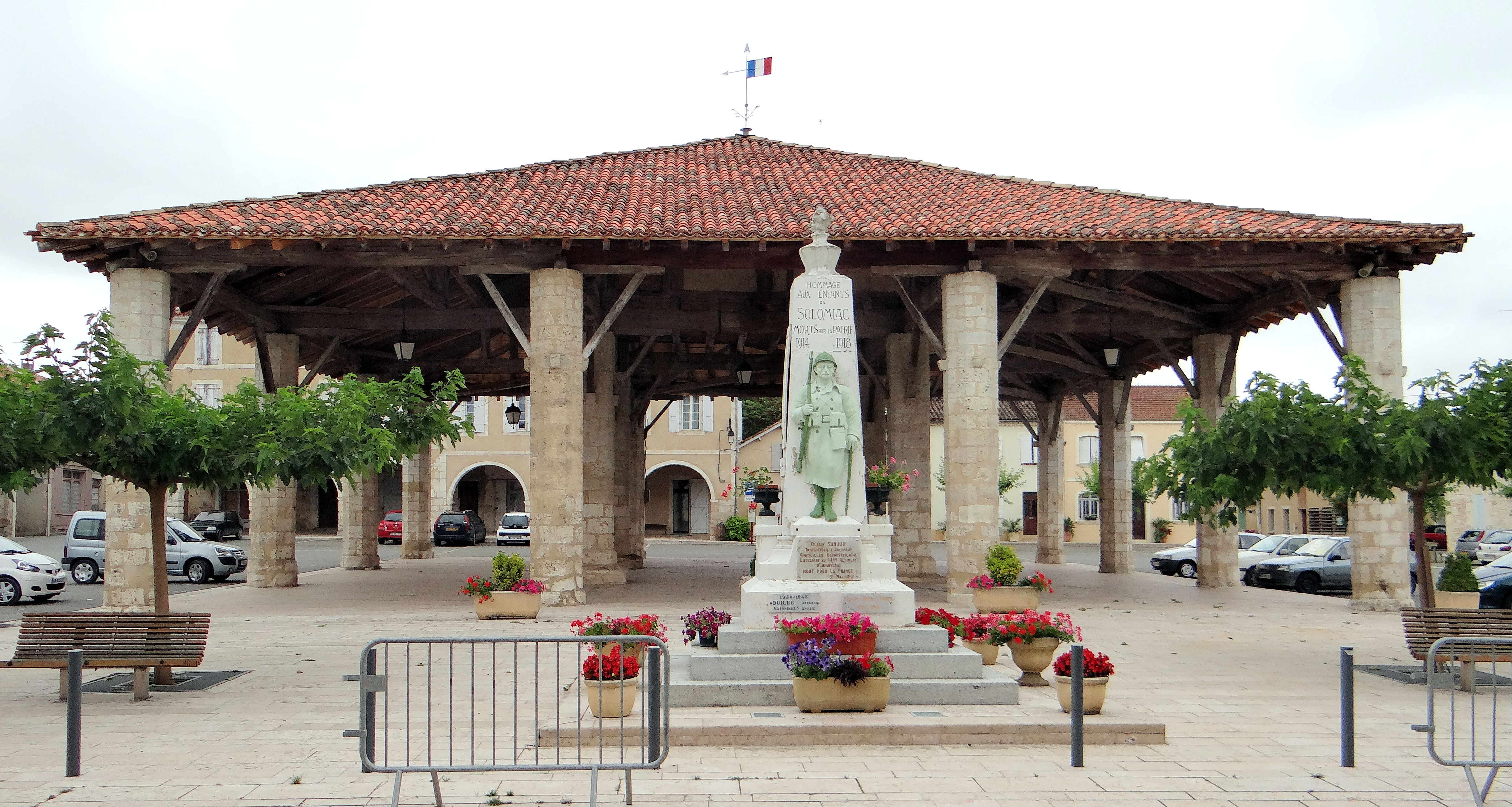 Halle de Solomiac et monument aux Morts